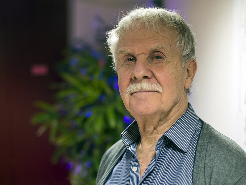 Hermann au Festival d'Angoulême 2017.